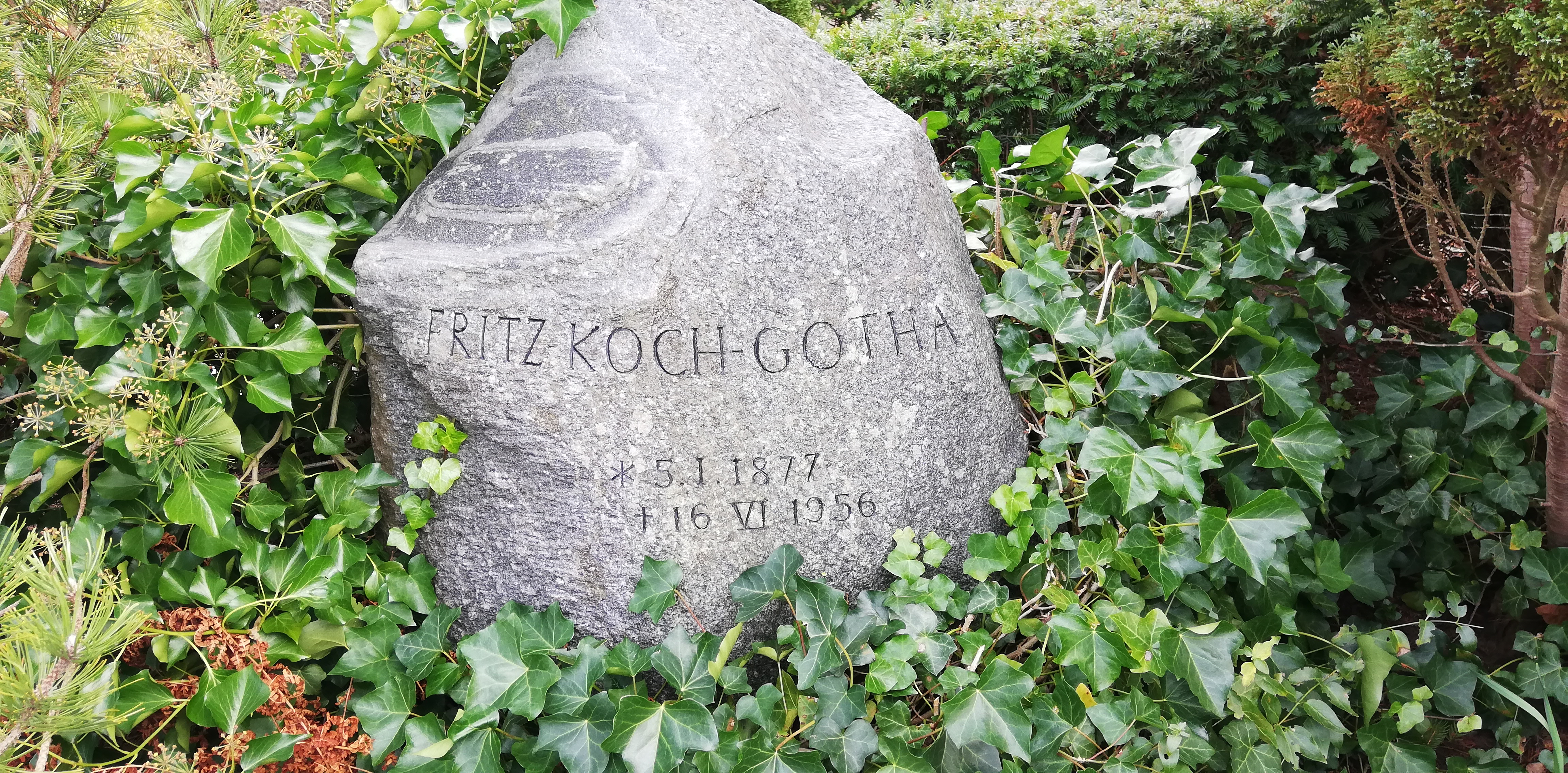 Es handelt sich um den Grabstein von Fritz Koch-Gotha auf dem Friedhof Wustrow